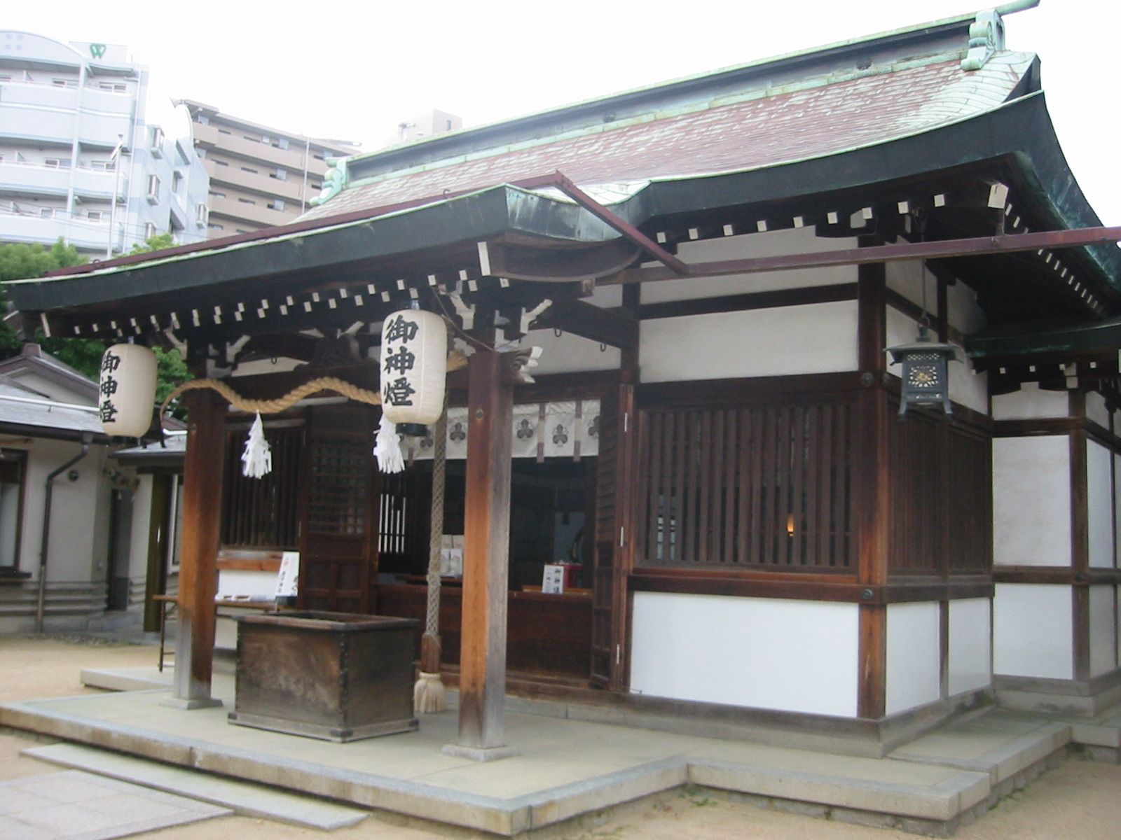 神戸蛭子神社